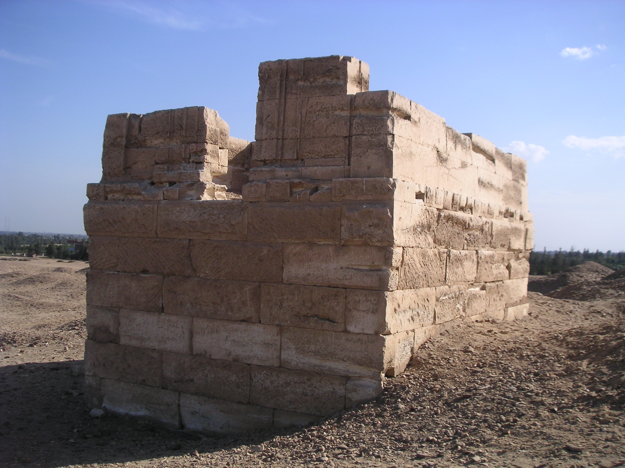 Tombeau-chapelle de la nécropole de Térénouthis - époque gréco-romaine - Kôm Abou Billou - novembre 2004